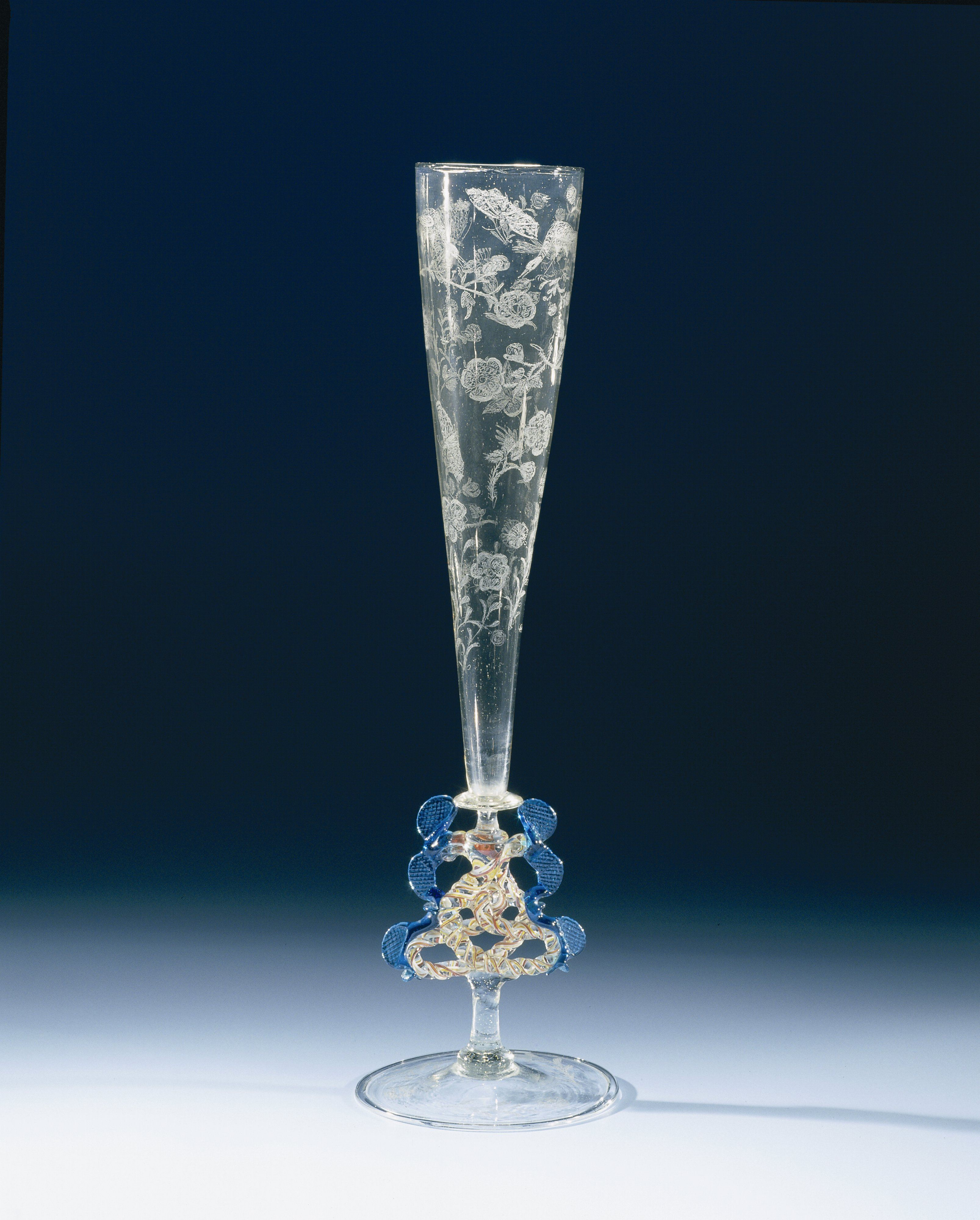 IdentificatieTitel(s): FluitglasFluitglas met bloemranken, vogels en insectenObjecttype: fluitglas vleugelglas slangenglas Objectnummer: BK-NM-8011Omschrijving: Platte voet met omgeslagen rand. De stam opgebouwd uit een getordeerde draad, Waar: in witte, rode en blauwe draden zijn gesmolten. Ter weerskanten blauwe, geknepen vleugeltjes. Hoge, trechtervomrige kelk, waarop bloemranken, vogels en insecten zijn gegraveerd.VervaardigingVervaardiger: glasblazer: anoniemglasgraveur: anoniemPlaats vervaardiging: glasblazer: Nederlandenglasgraveur: Noordelijke NederlandenDatering: ca. 1675 - ca. 1700Fysieke kenmerken: helder, kleurloos, rood, wit en blauw glas met diamantgravureMateriaal: glas Techniek: Façon de Venise / diamantgraveren / glasblazenAfmetingen: h 30,4 cm. × d 8,7 cm. OnderwerpWat: birdsflowersVerwerving en rechtenVerwerving: aankoop 1885Copyright: Publiek domein